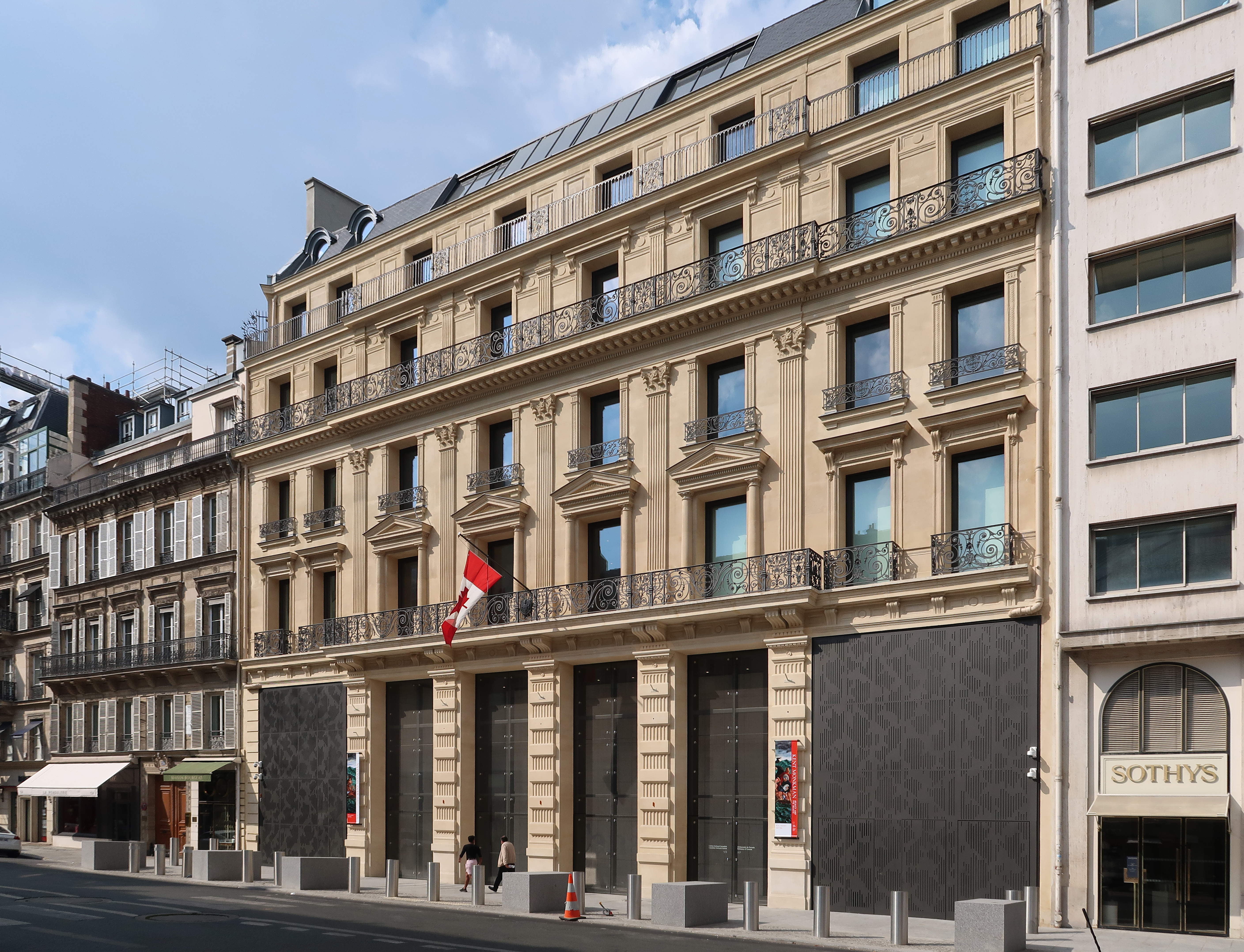 Nouvelle ambassade et centre culturel du Canada en France, 130 rue du Faubourg Saint-Honoré (Paris 8e).